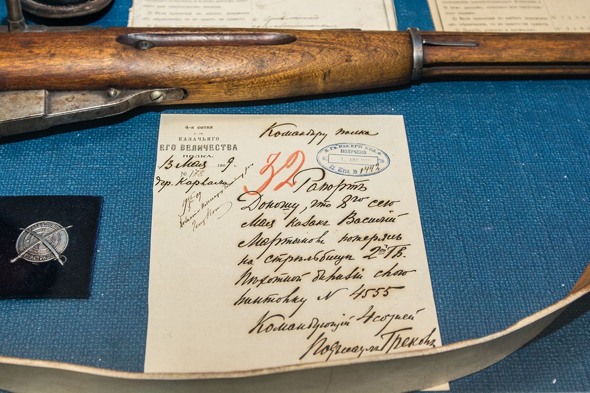 Фото документа в витрине Культурно-выставочного центра «Донская казачья гвардия»